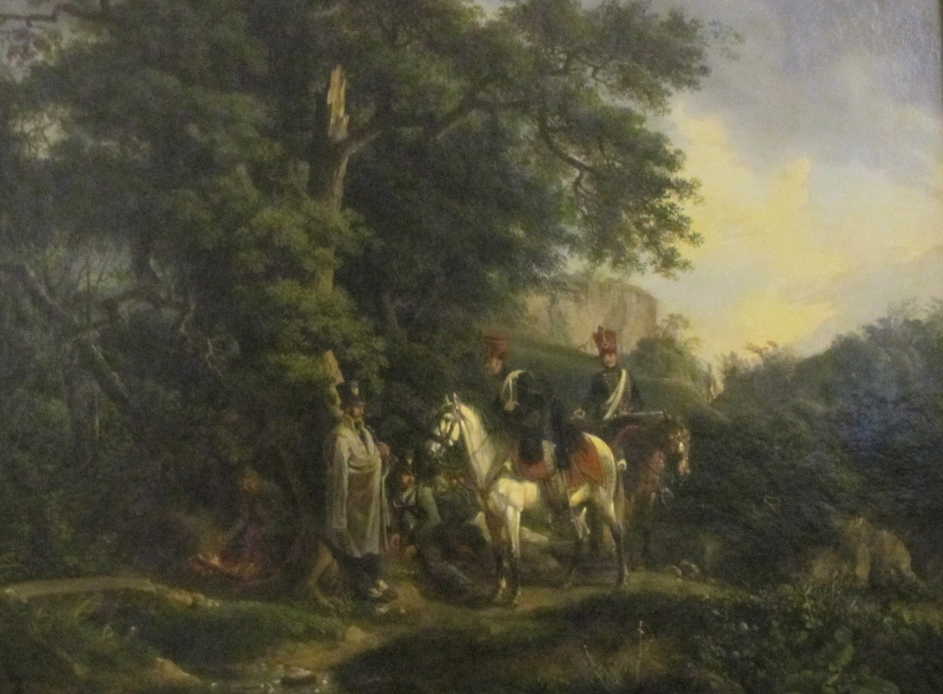 Jägerfeldwache und Husarenpatrouille, Gemälde im Heeresgeschichtlichen Museum in Wien